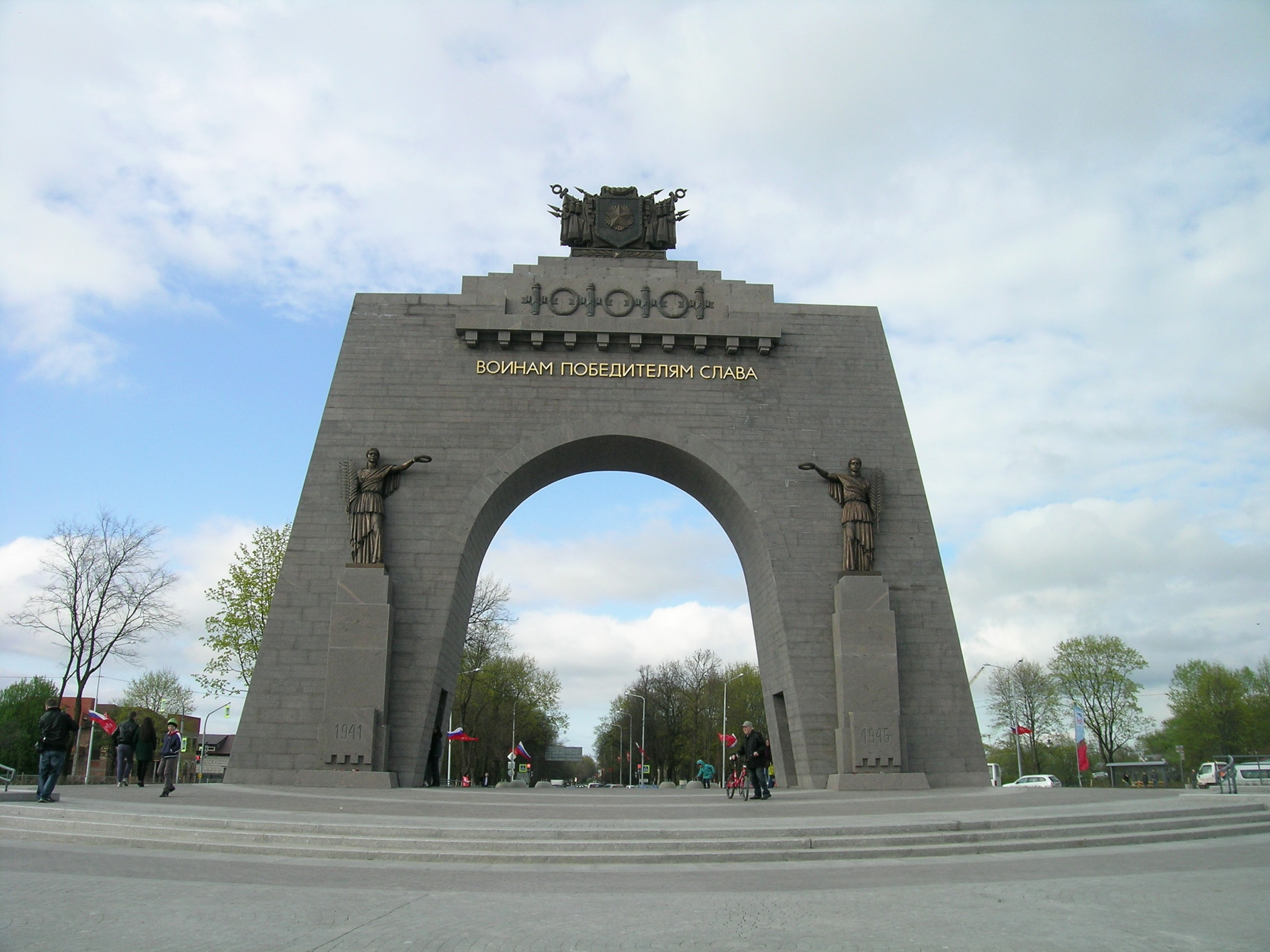 «Арка Победы». Красное Село (Санкт-Петербург), Гатчинское шоссе. За основу проекта была взята временная триумфальная арка по проекту архитектора А. И. Гегелло, установленная летом 1945 года на Средней Рогатке. Архитектор воссоздания — Владимир Попов, скульптор — Борис Петров. Открыта 9 мая 2015 года